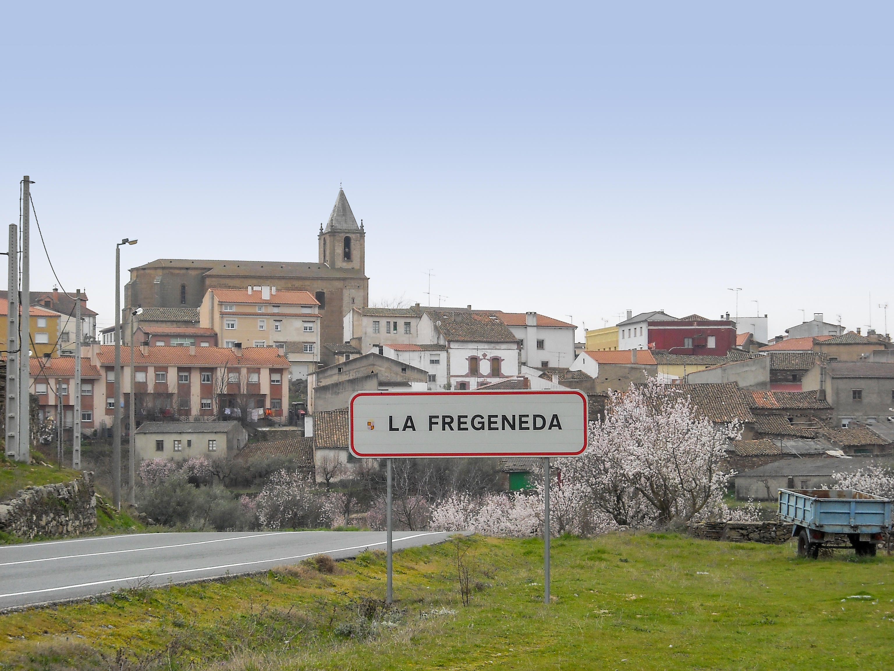 Fotografia de la CL-517 a su paso por La Fregeneda